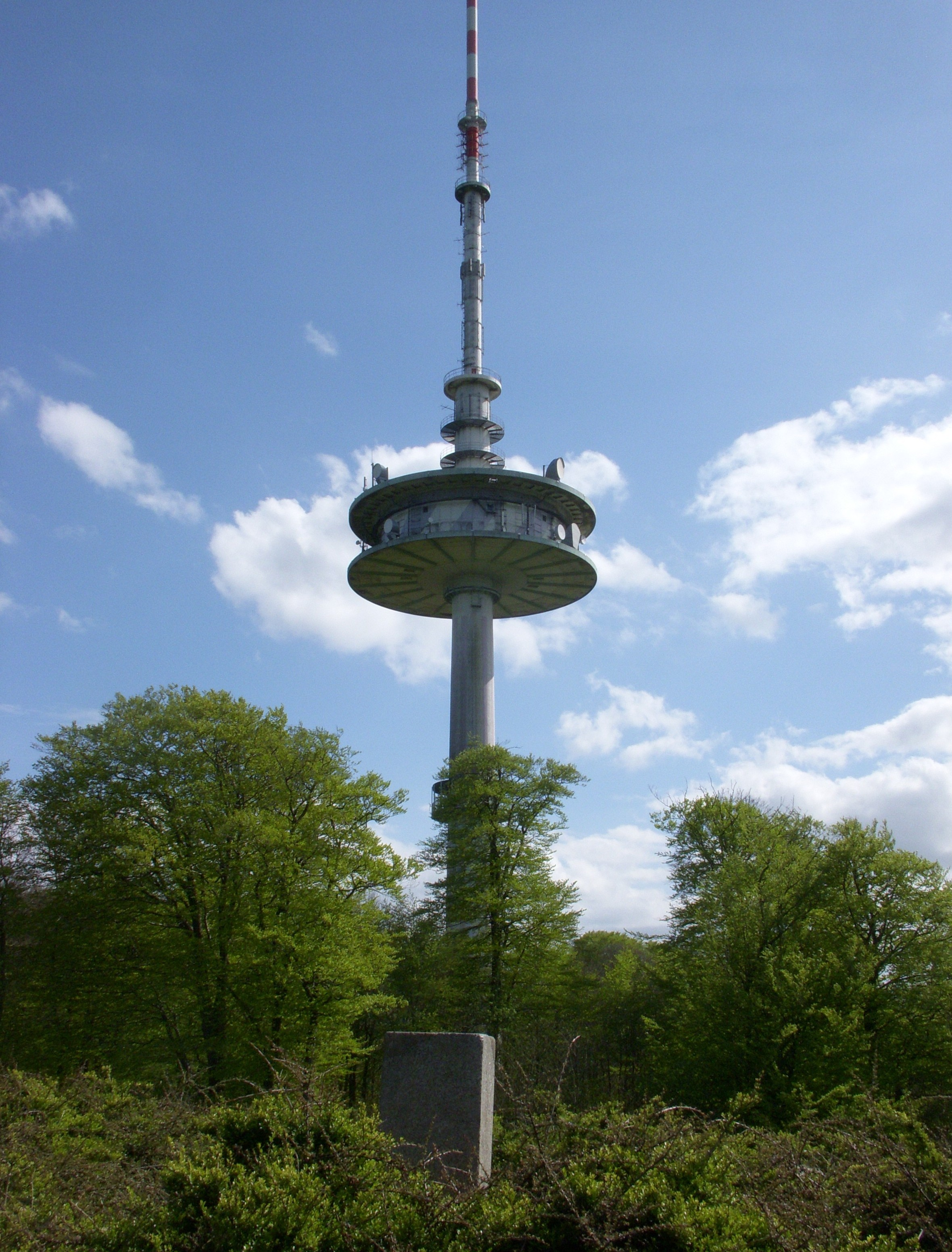 Bungsberg Fernmeldeturm